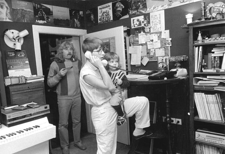 Berlin, Reinhard Lakomy, Monika Ehrhardt ADN-ZB Senft 7.1.87 Berlin: Vorwiegend für Kinder arbeitet die Schriftstellerin Monika Ehrhardt, hier mit ihrer Tochter Hanni. Musikalisches zu den Versen kommt oft vom Komponisten und Musiker Reinhard Lakomy dazu, mit dem sie seit 1977 verheiratet ist. Monika Ehrhardt ist Mitglied des Schriftstellerverbandes und wurde 1986 als Abgeordnete der Stadtverordnetenversammlung Berlin gewählt. Seit 1968 ist sie Mitglied der SED. -siehe dazu die Fotos 1987-0107-16 u. 17N-“ Abgebildete Personen: Lakomy, Reinhard: Sänger, Komponist, DDR (GND 121996468) Ehrhardt, Monika: Schriftstellerin, DDR (GND 111291593)